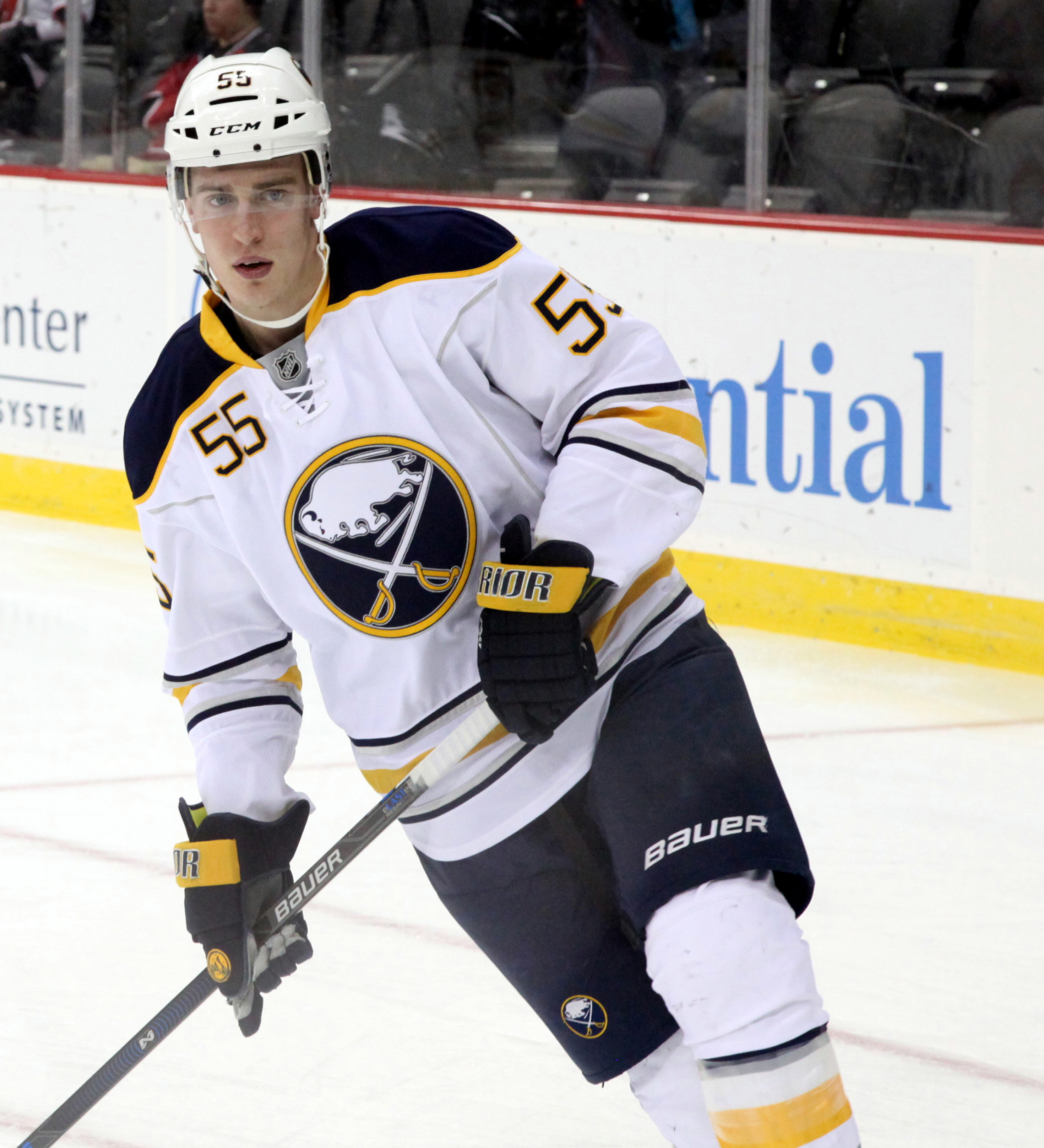 Rasmus Ristolainen in April 2016.